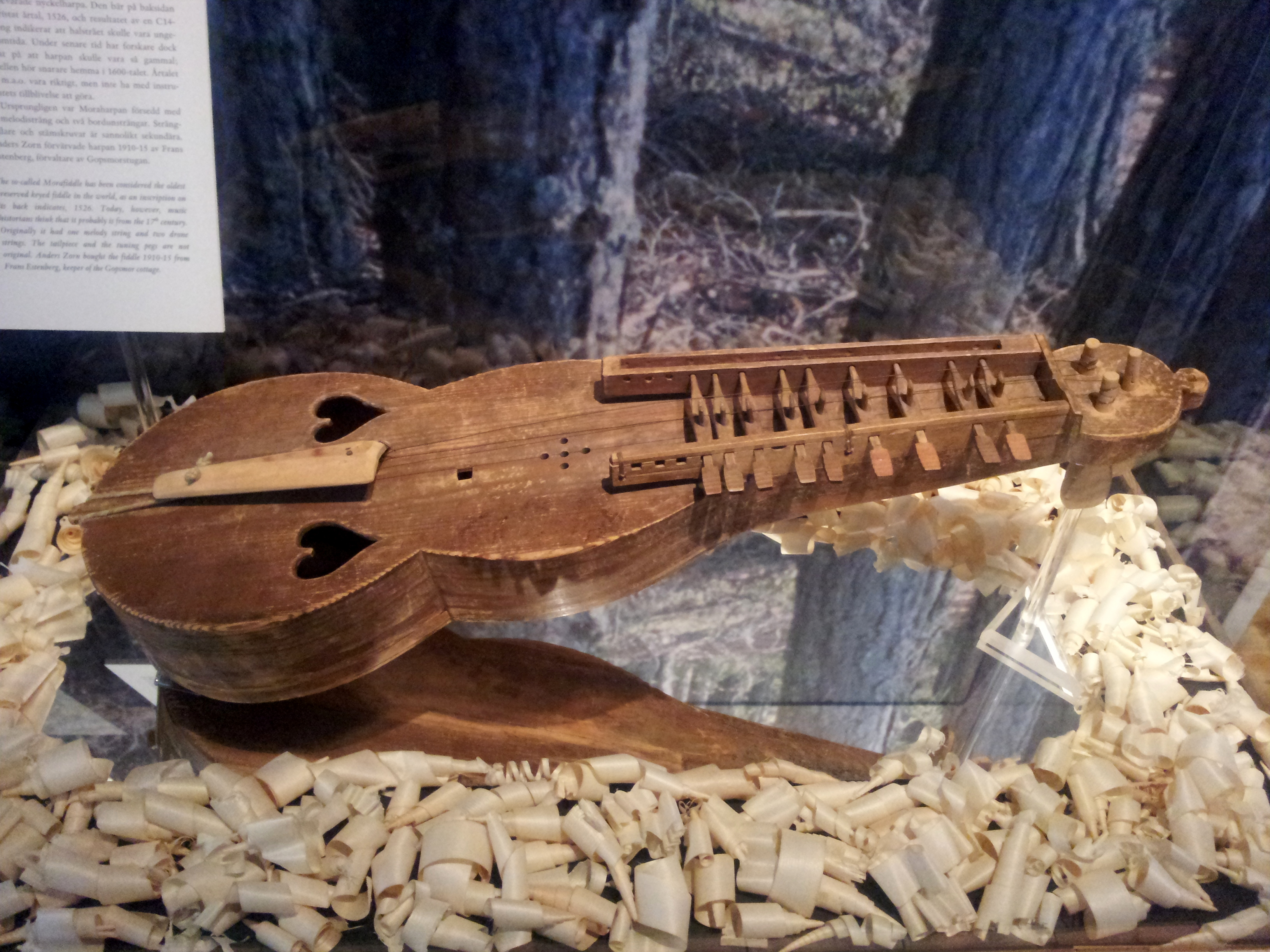 Moraharpa på Zornmuseet, från 1500- eller 1600-tal.